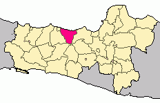 Batang in Central Java